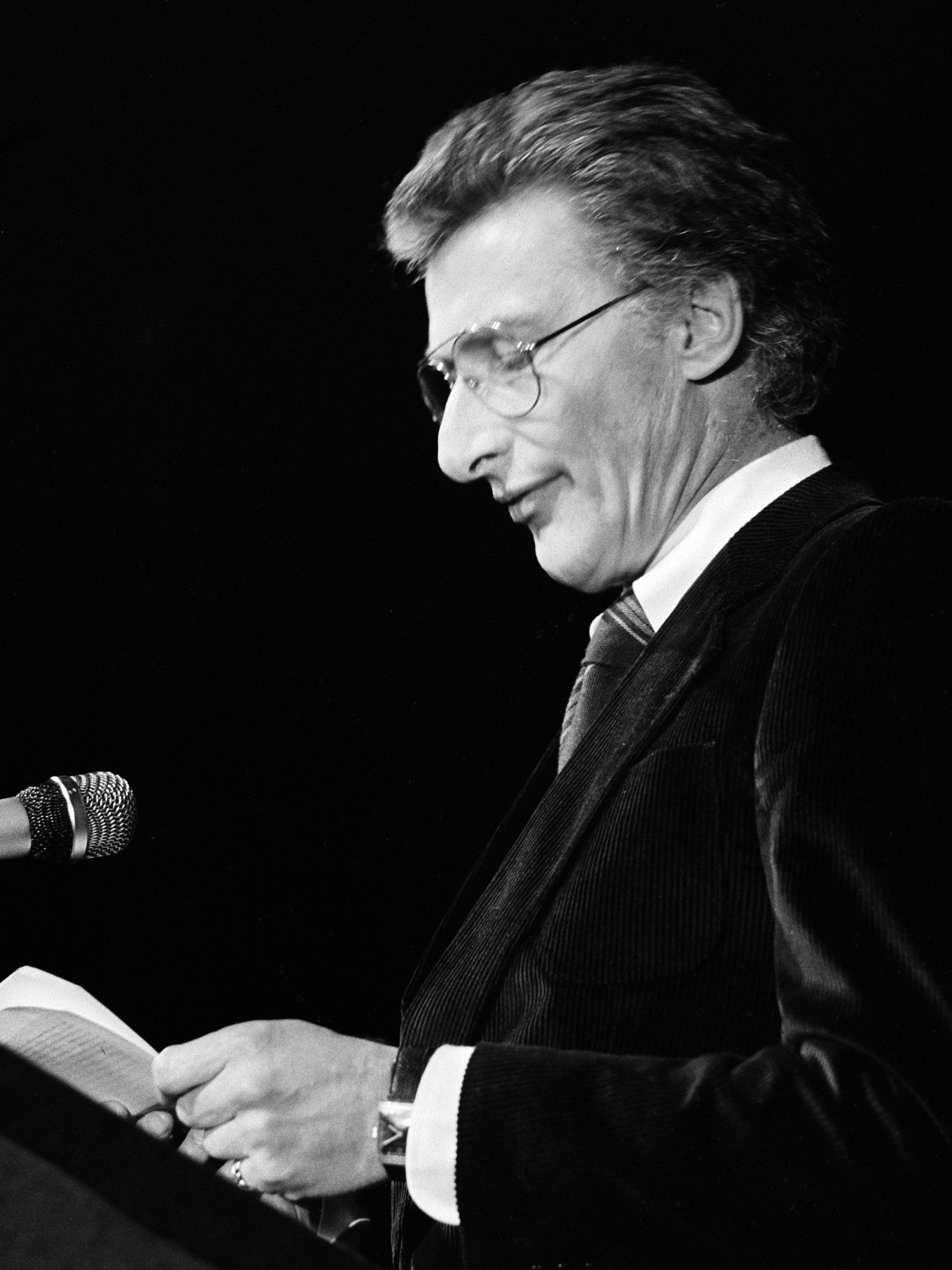 Uitreiking van de PC Hooftprijs 1977 aan Harry Mulisch